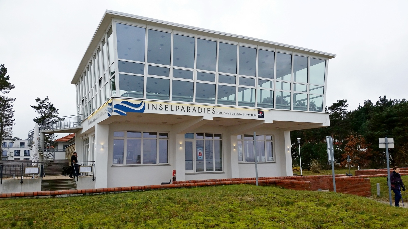 Ansicht nach Wiedereröffnung Ende März 2017